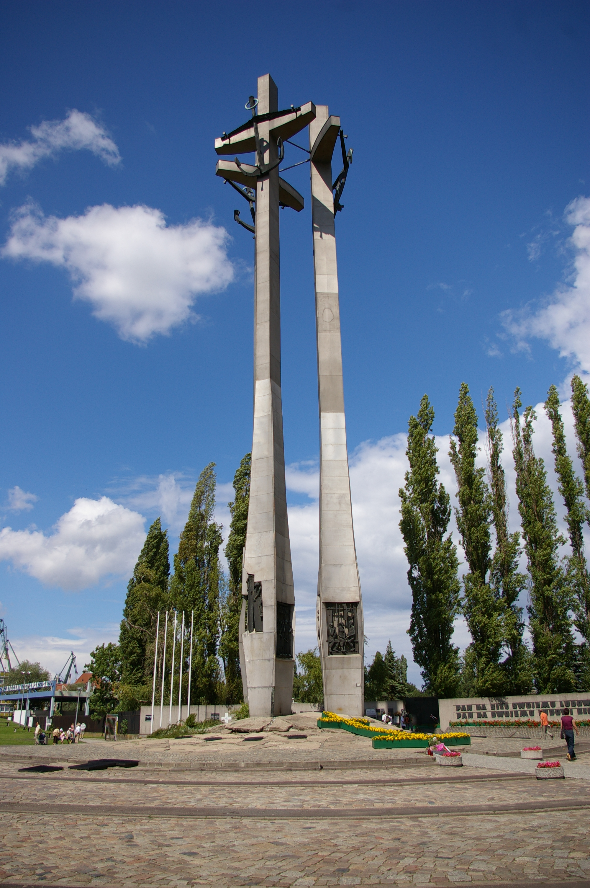 Pomnik Ofiar Grudnia 1970 w Gdańsku na Placu Poległych Stoczniowców